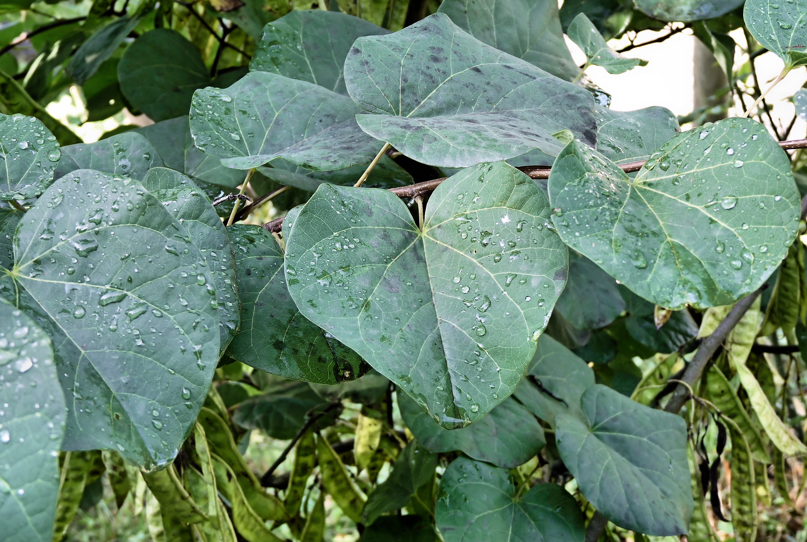 Feuilles de l'arbre du Judée